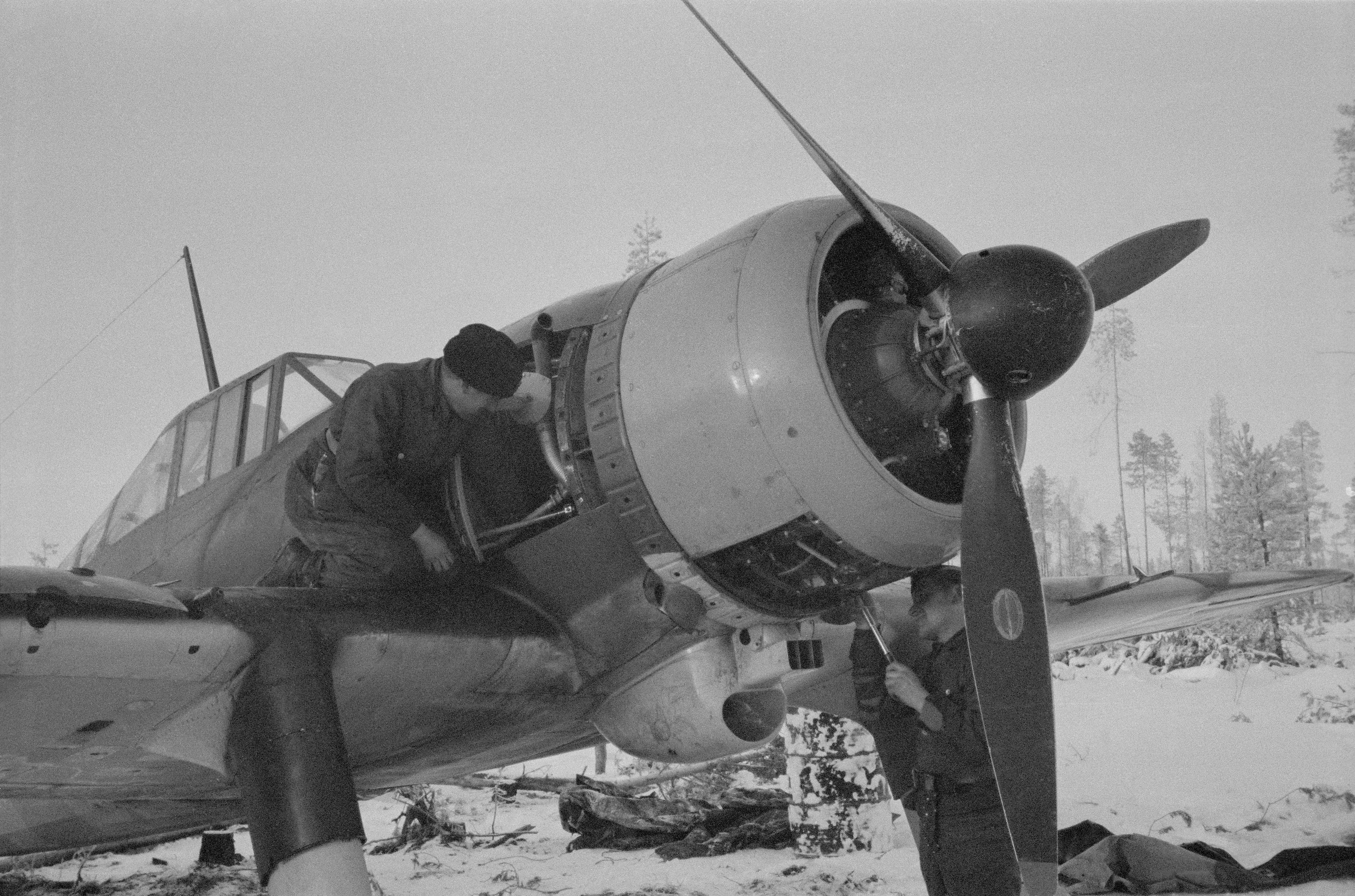 Hävittäjää laitetaan taistelukuntoon Tiiksin lentotukikohdassa. Mekaanikkojen sormi ei saa palella vaikka pakkasta 26 astetta. (Kuvassa on Fokker D.XXI). Kuvauspaikka: Tiiksjärven lentotukikohta